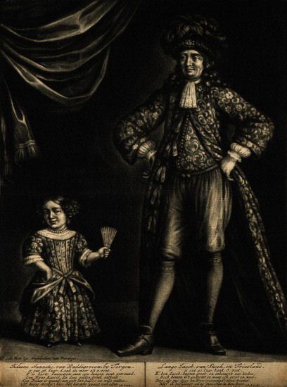 Lange Jacob en Kleine Jannetje